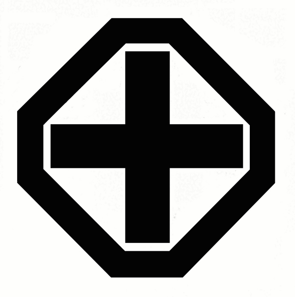 Japanese House Crest (Kamon) "Kayanouchi Jumonji": Itagaki Taisuke's Family Crest.